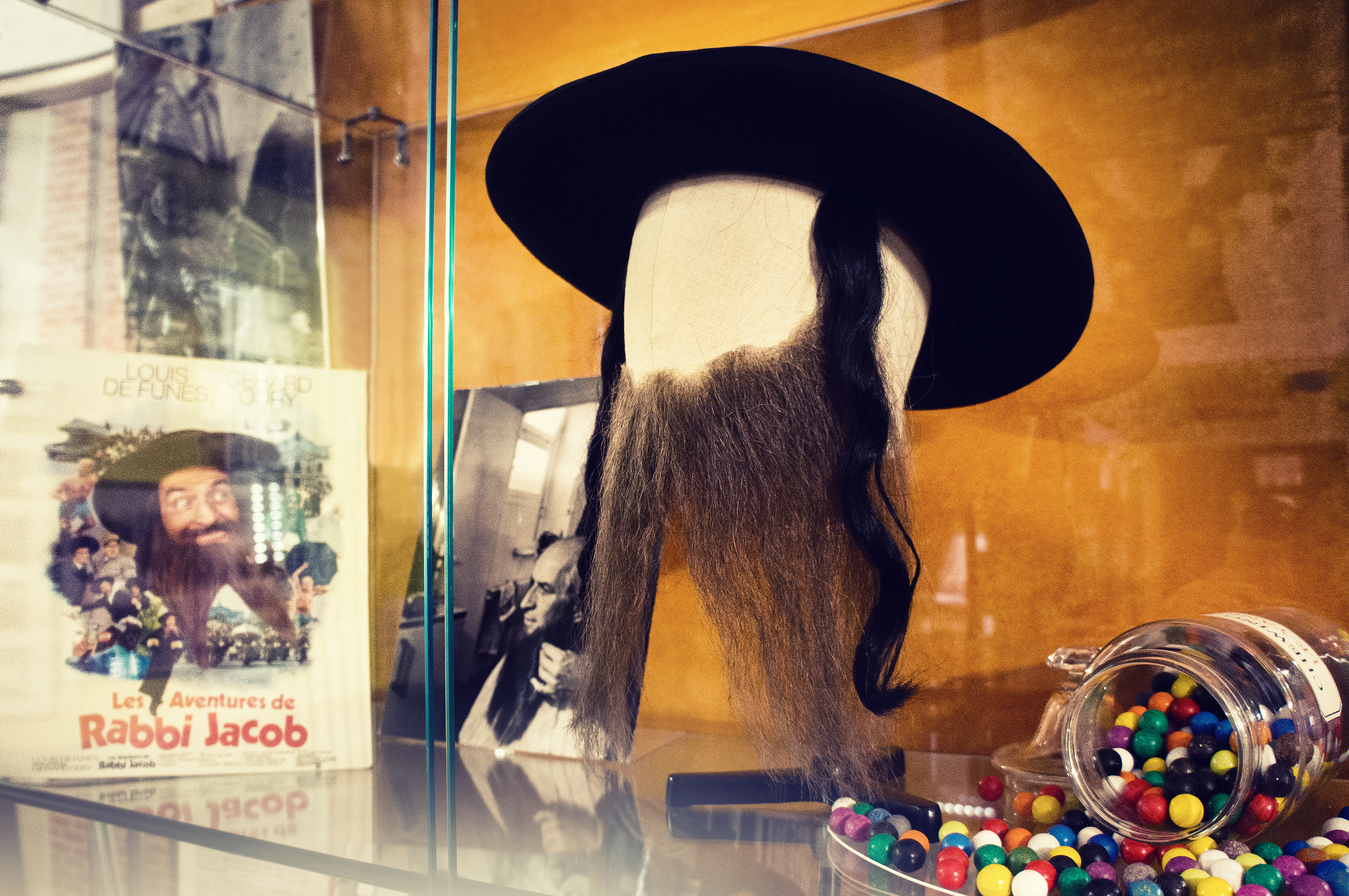 Éléments du costume de Louis de Funès dans le film Les Aventures de Rabbi Jacob : postiche de barbe, chapeau et papilottes. À droite, quelques billes de faux chewing-gum Le Yankee utilisées dans une scène du film. Exposé au Musée Louis de Funès.